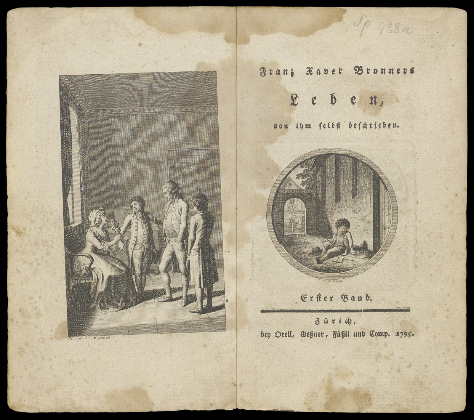 Franz Xaver Bronners Leben, von ihm selbst beschrieben. 3 Bde. Zürich, 1795–1797